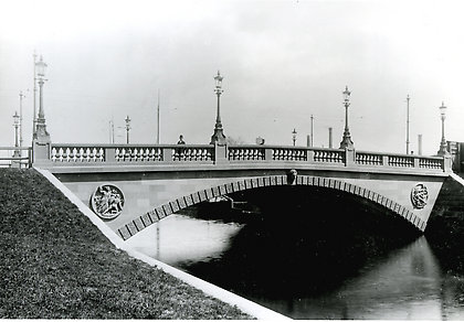 Wiener Brücke im Zuge der Wiener Straße über den Landwehrkanal, vom Görlitzer Ufer zur Lohmühlenstraße.